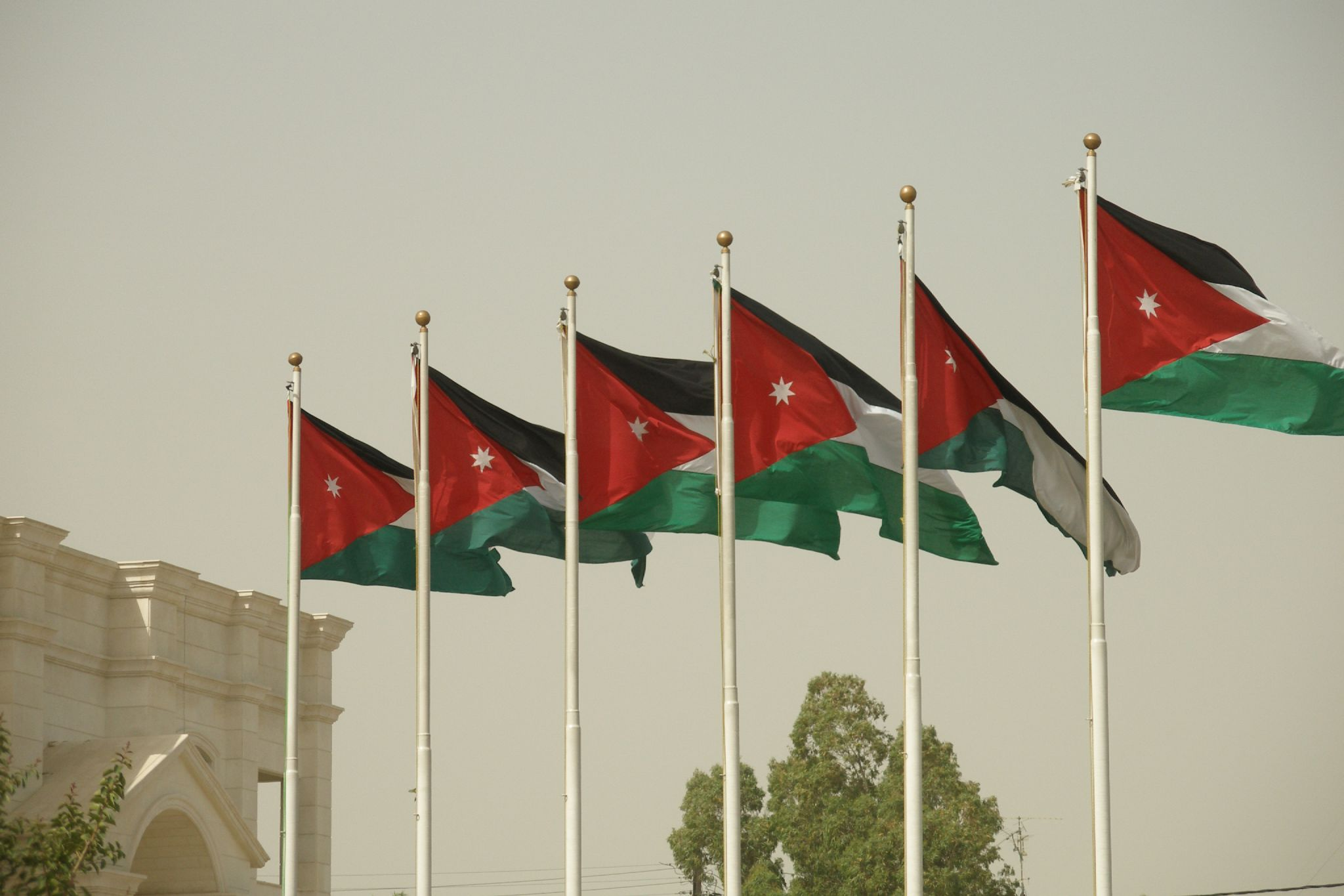 Jordan flag (2007-05-797)